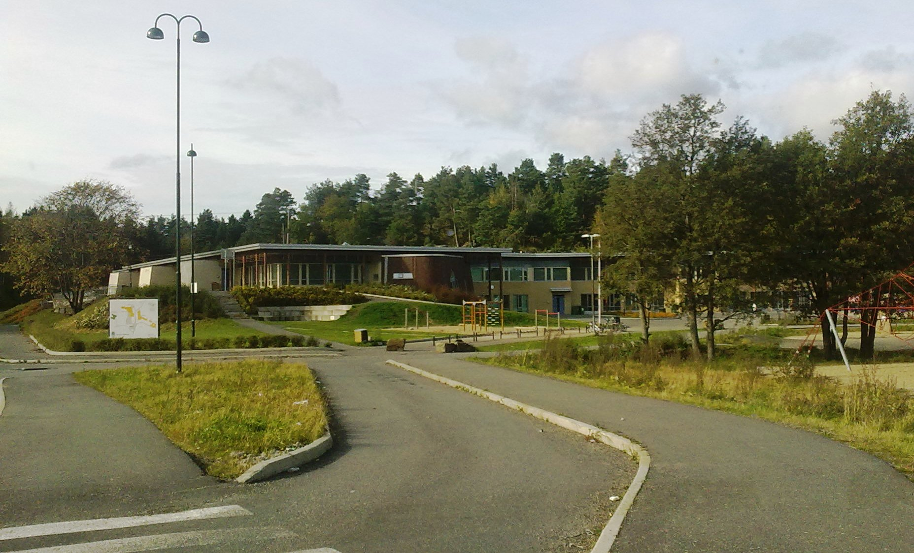 Asdal skole i Arendal, barnetrinnet